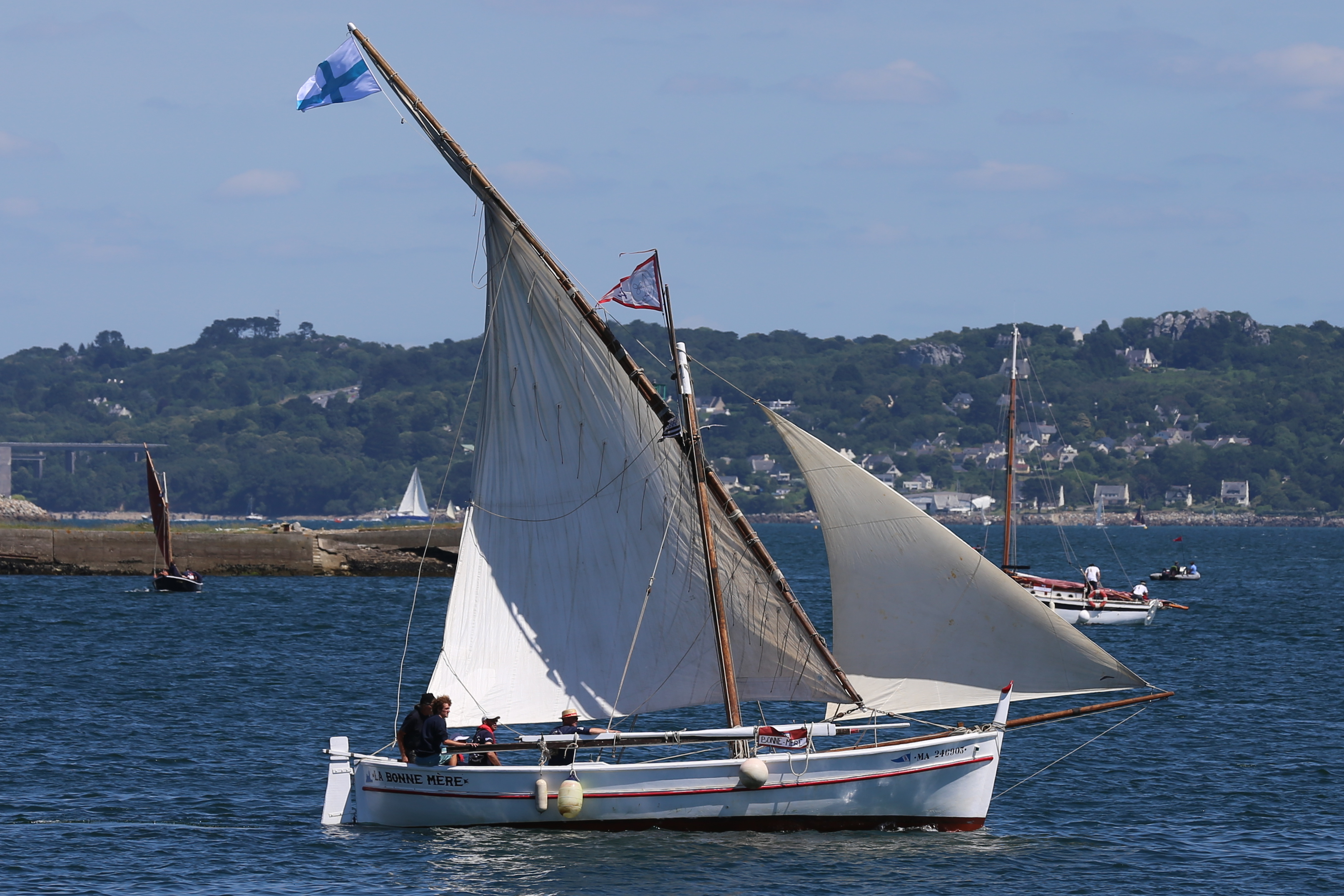 La Bonne Mère, barquette marseillaise à Brest 2016.